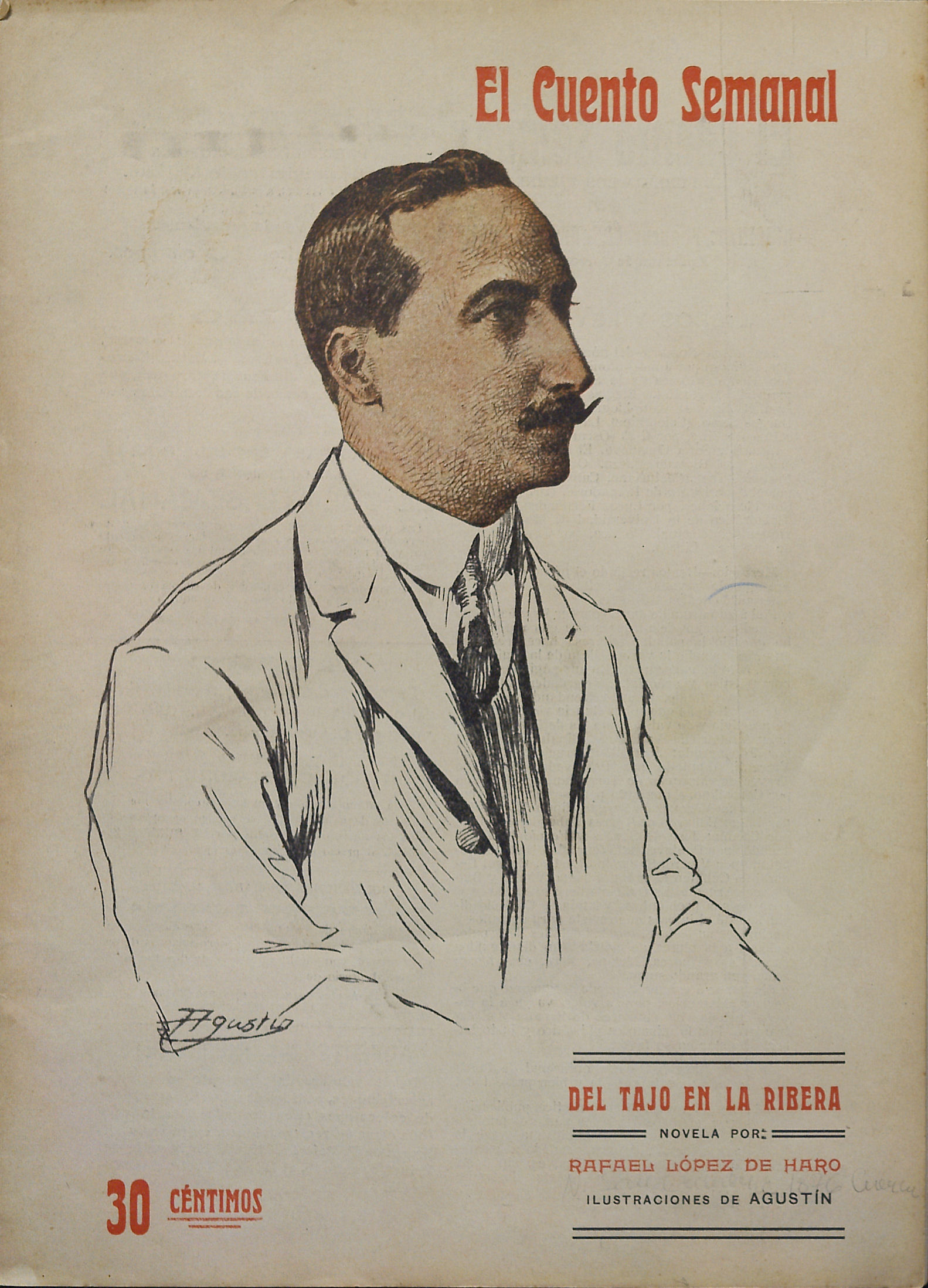 Del Tajo en la ribera, de Rafael López de Haro.